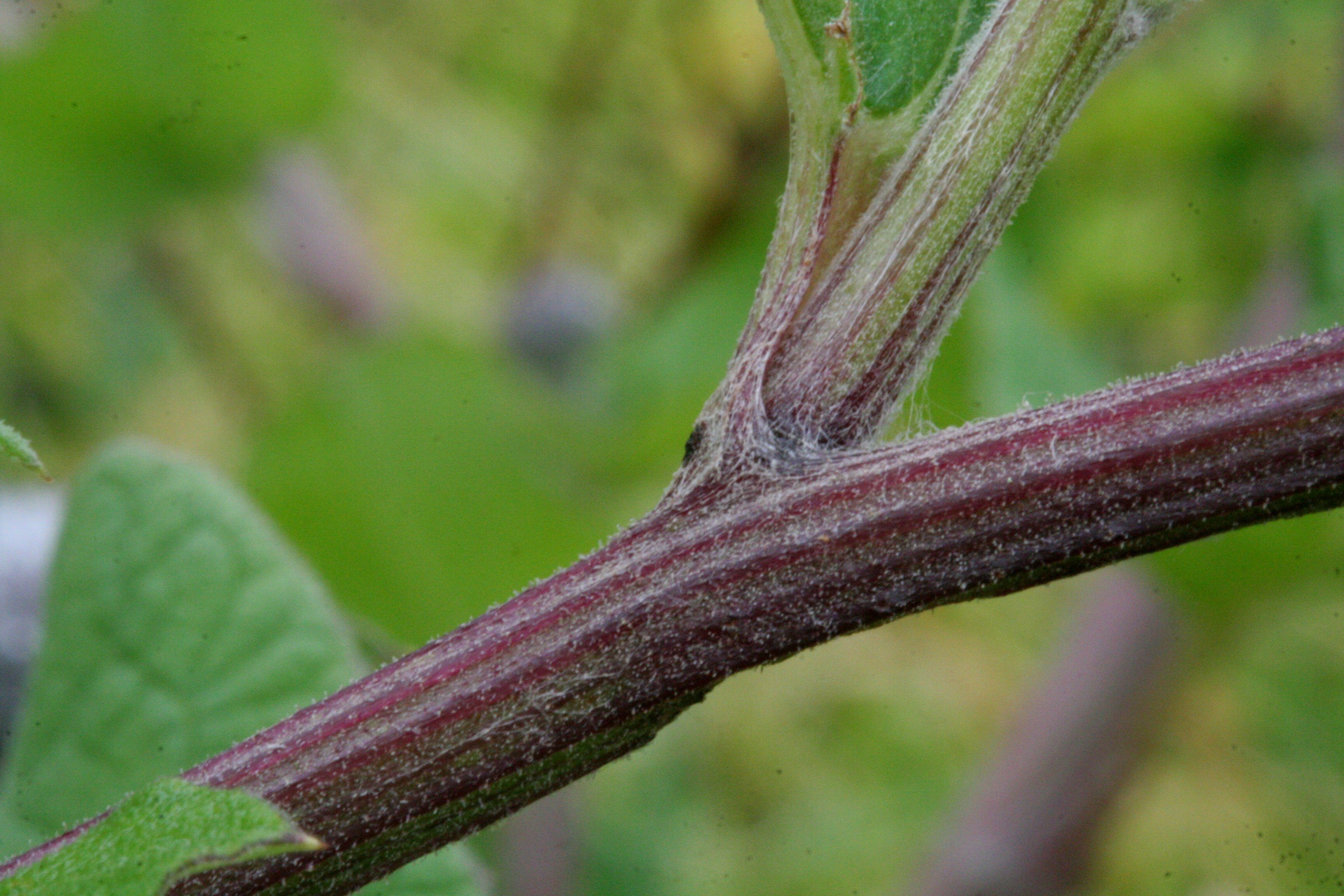 Arctium minus - Località: Cortina (BL), 1400 m s.l.m. - luglio 2008